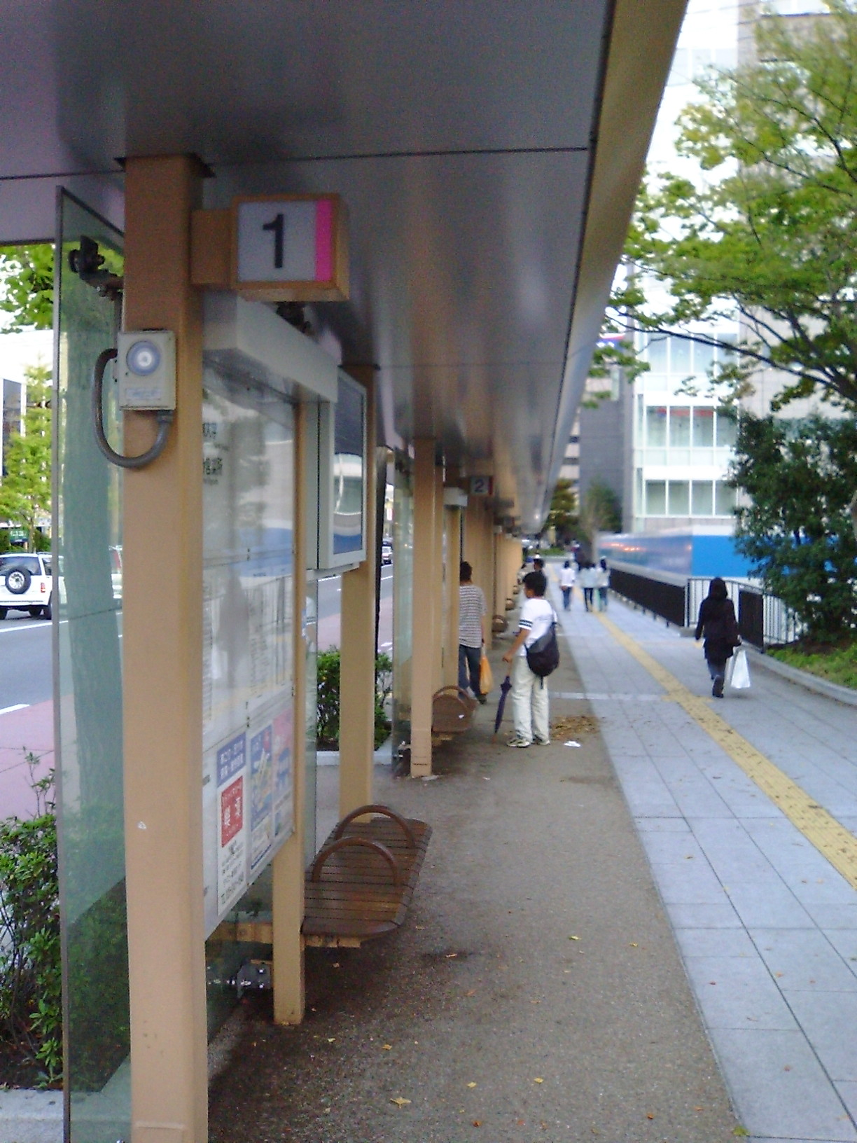 COZMIXビル前バス停。